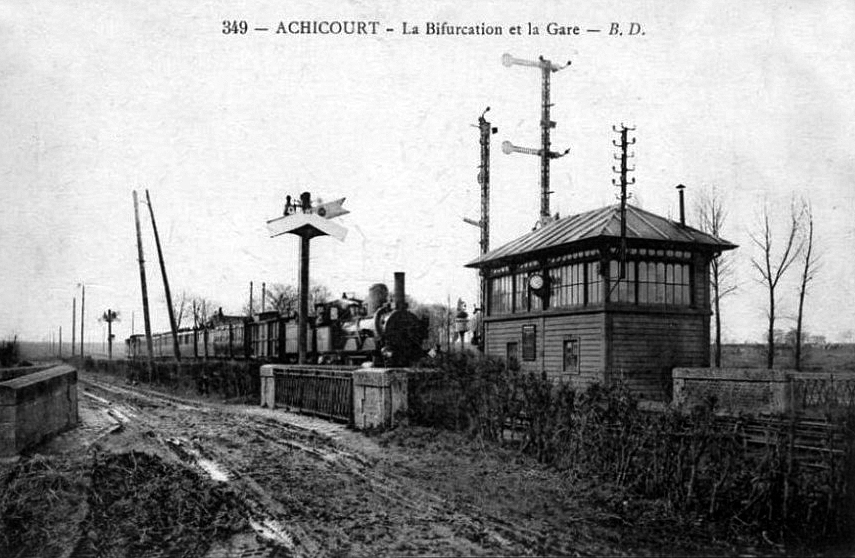 La bifurcation et la halte d'Achicourt au début du vingtième siècle, avant la Première Guerre mondiale.